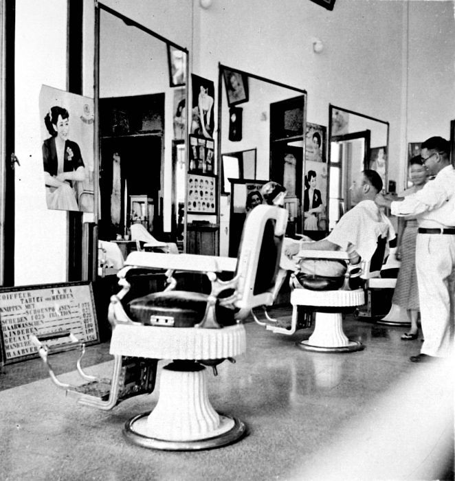 Repronegatief. Een kapsalon te Surabaya, Java